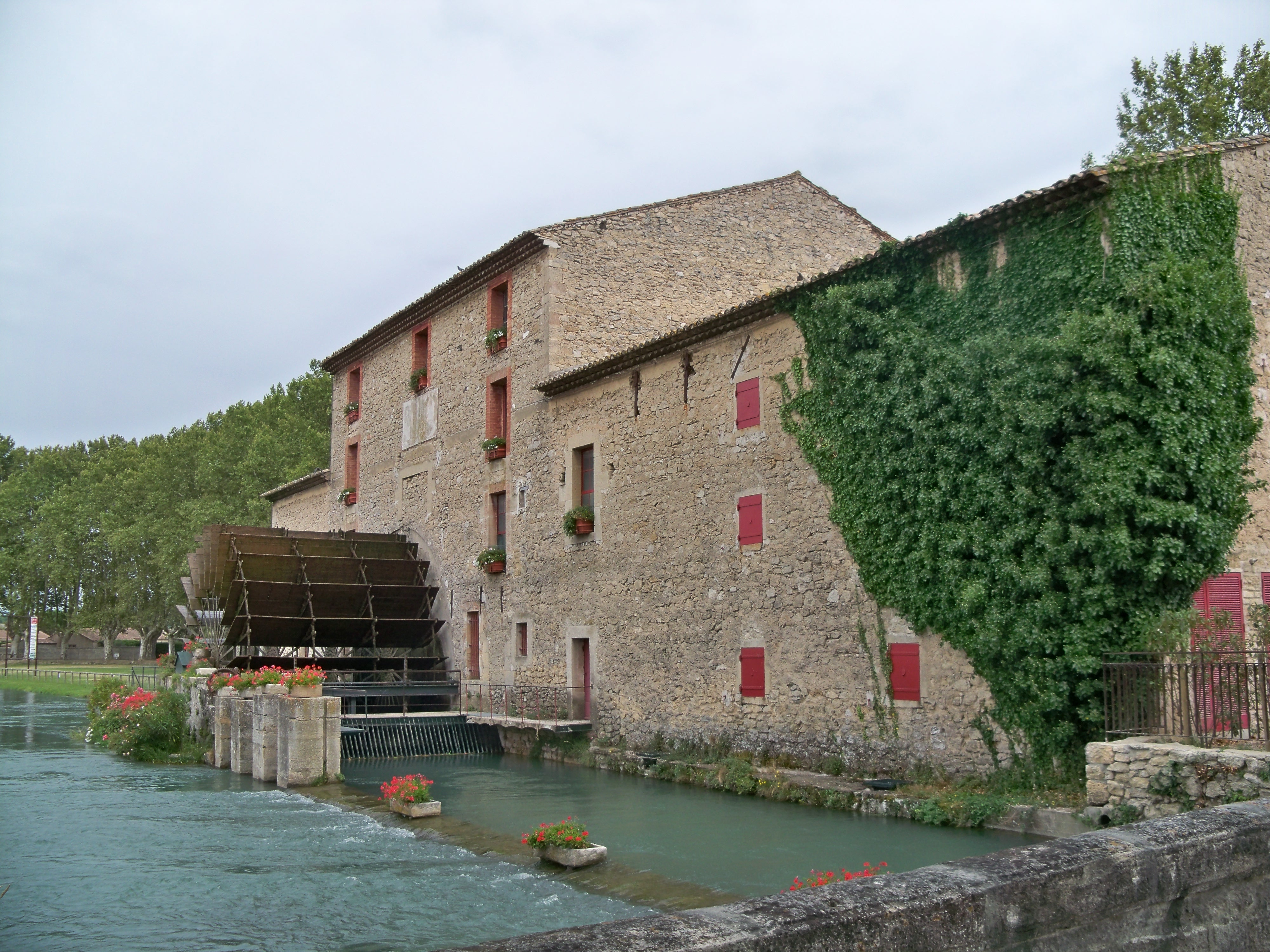 Moulin Saint Pierre (ancien moulin à Garances) aux Taillades, Vaucluse, France